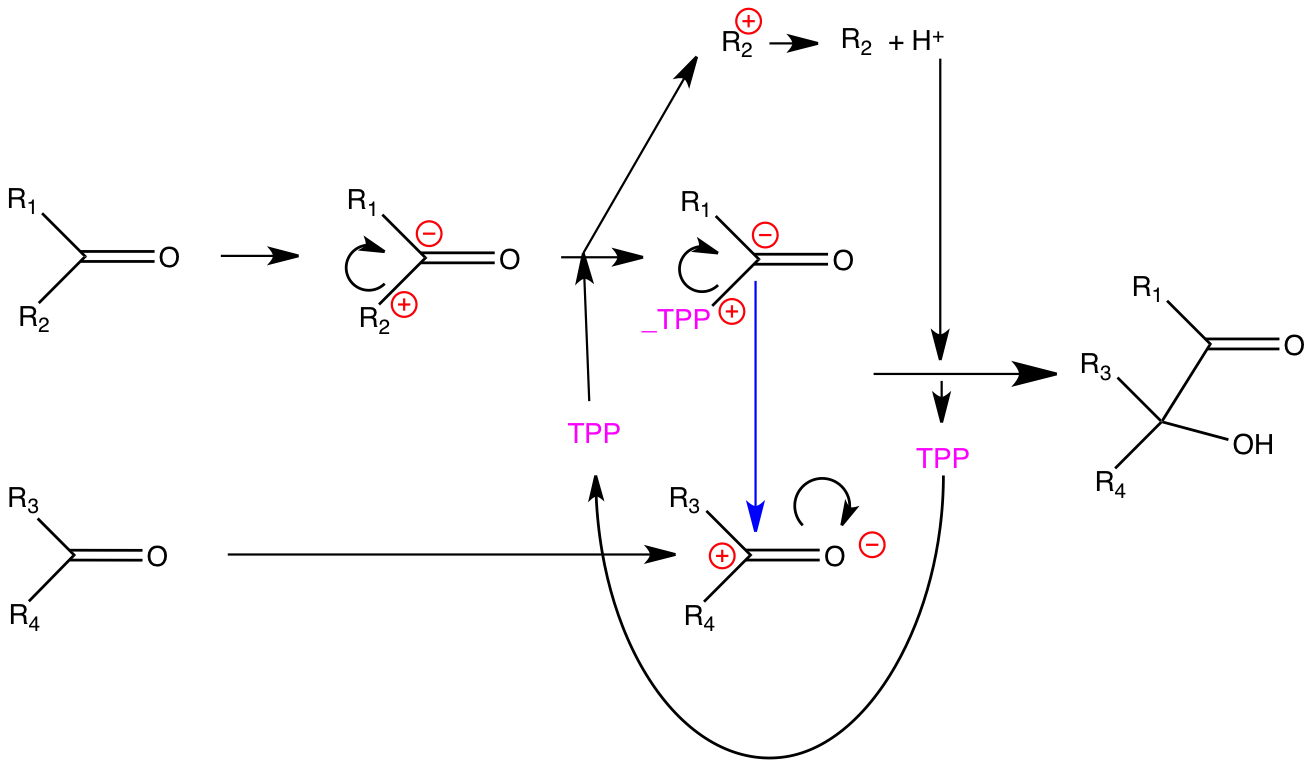 schéma général de l’action de la thiamine